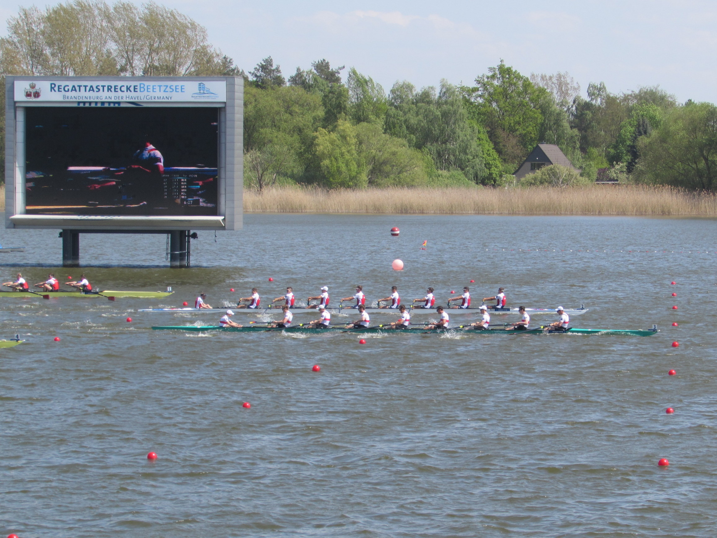 Achter-Rennen bei der Ruder-EM 2016; im Vordergrund Deutschland, dahinter Russland